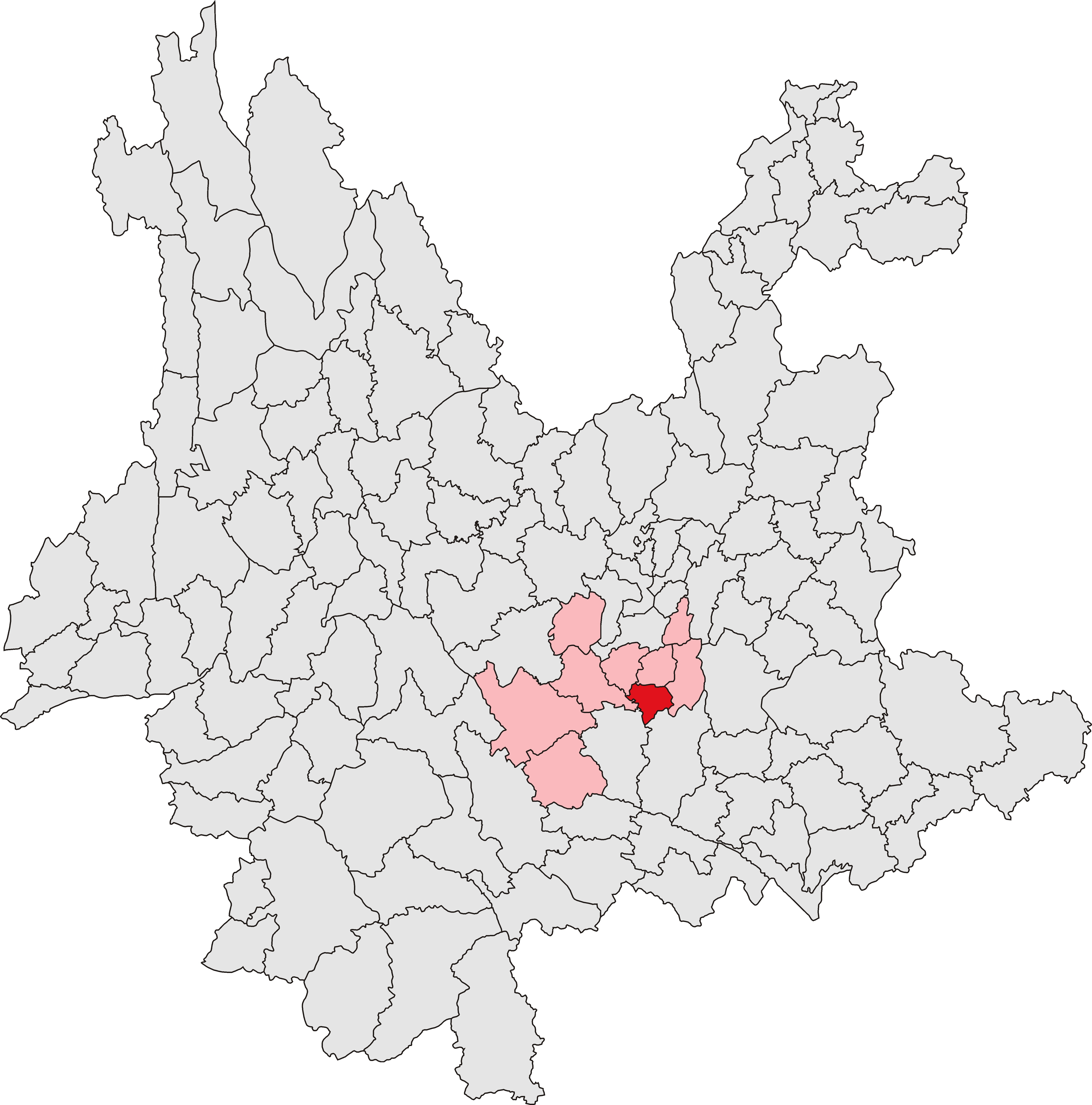 通海县位置图